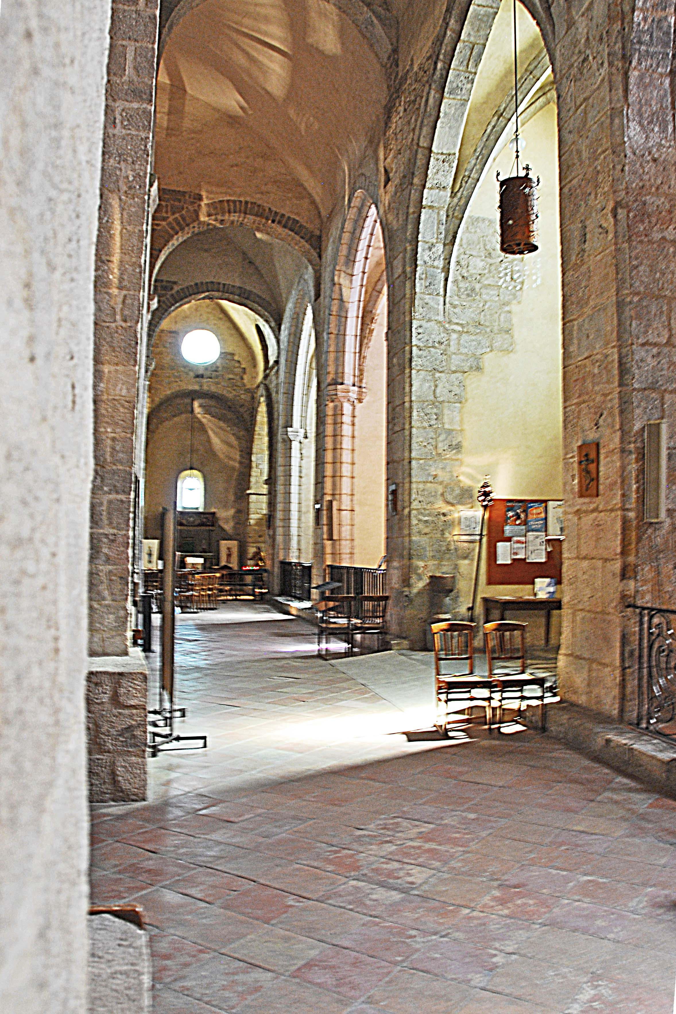 Ste-Eulalie-et-Ste-Julie_d’Elne, südl.Seitenschiff mit Südkapellen